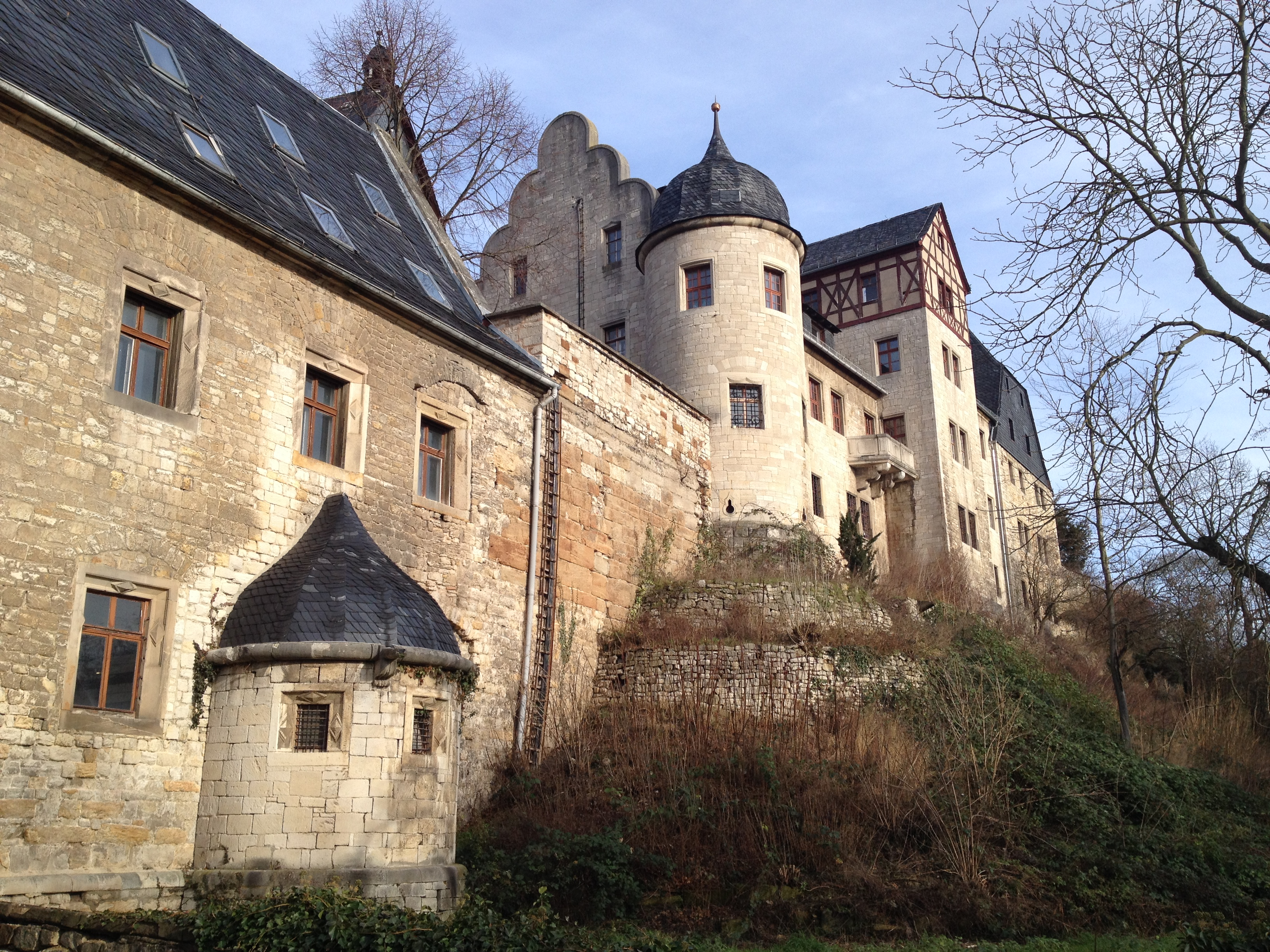 Schloss Beichlingen